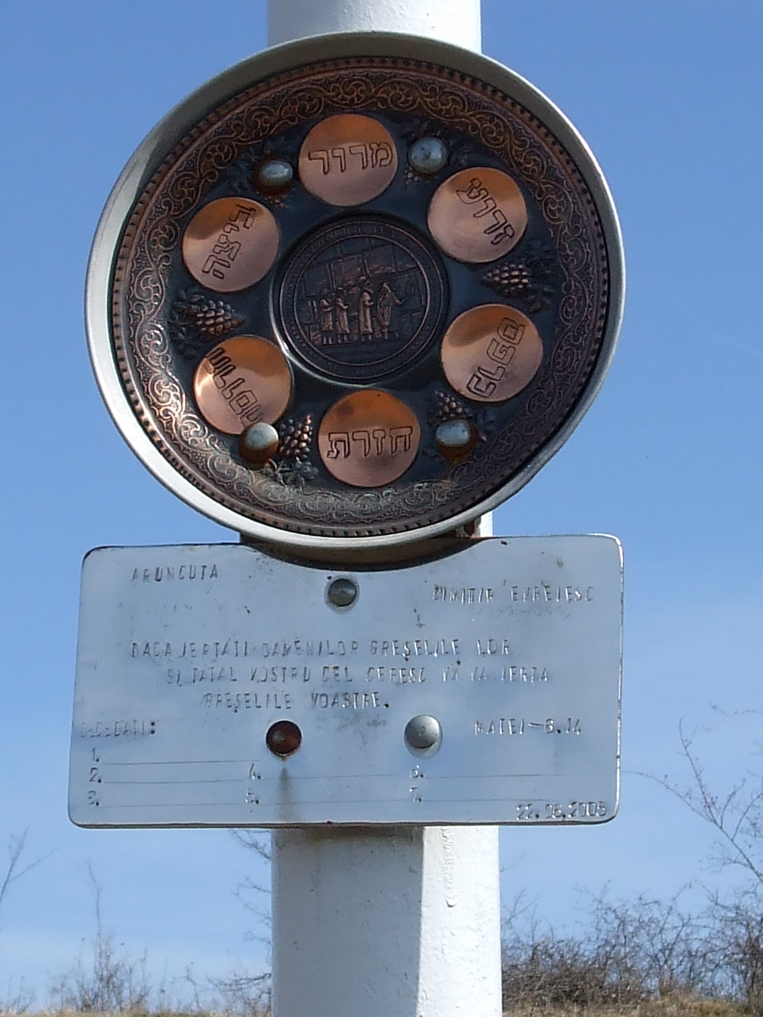 Az egykori aranykúti zsidók 2005-ben állított emlékműveRomână: Imagini din Aruncuta ,Cluj